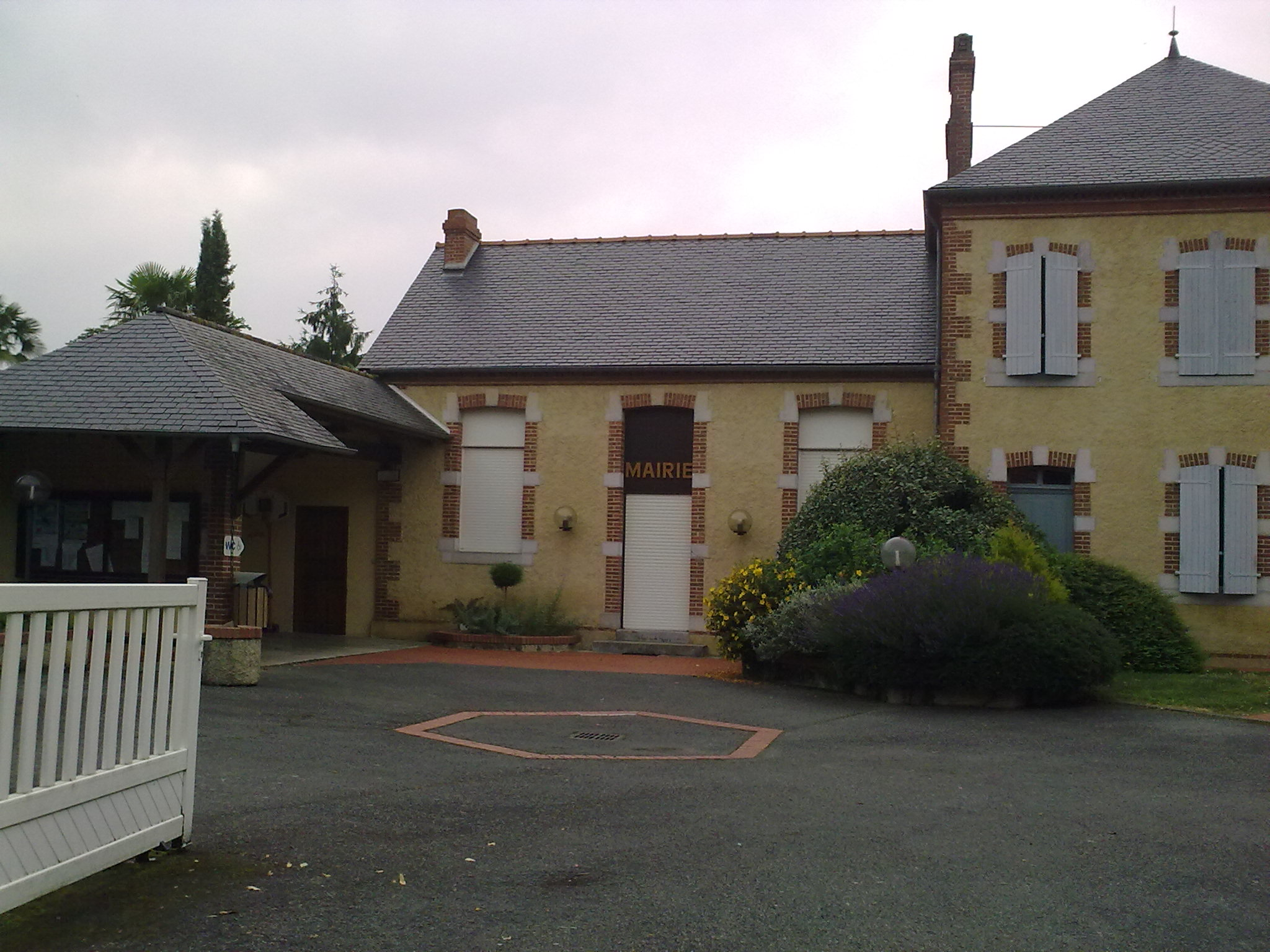 Mairie de Momy